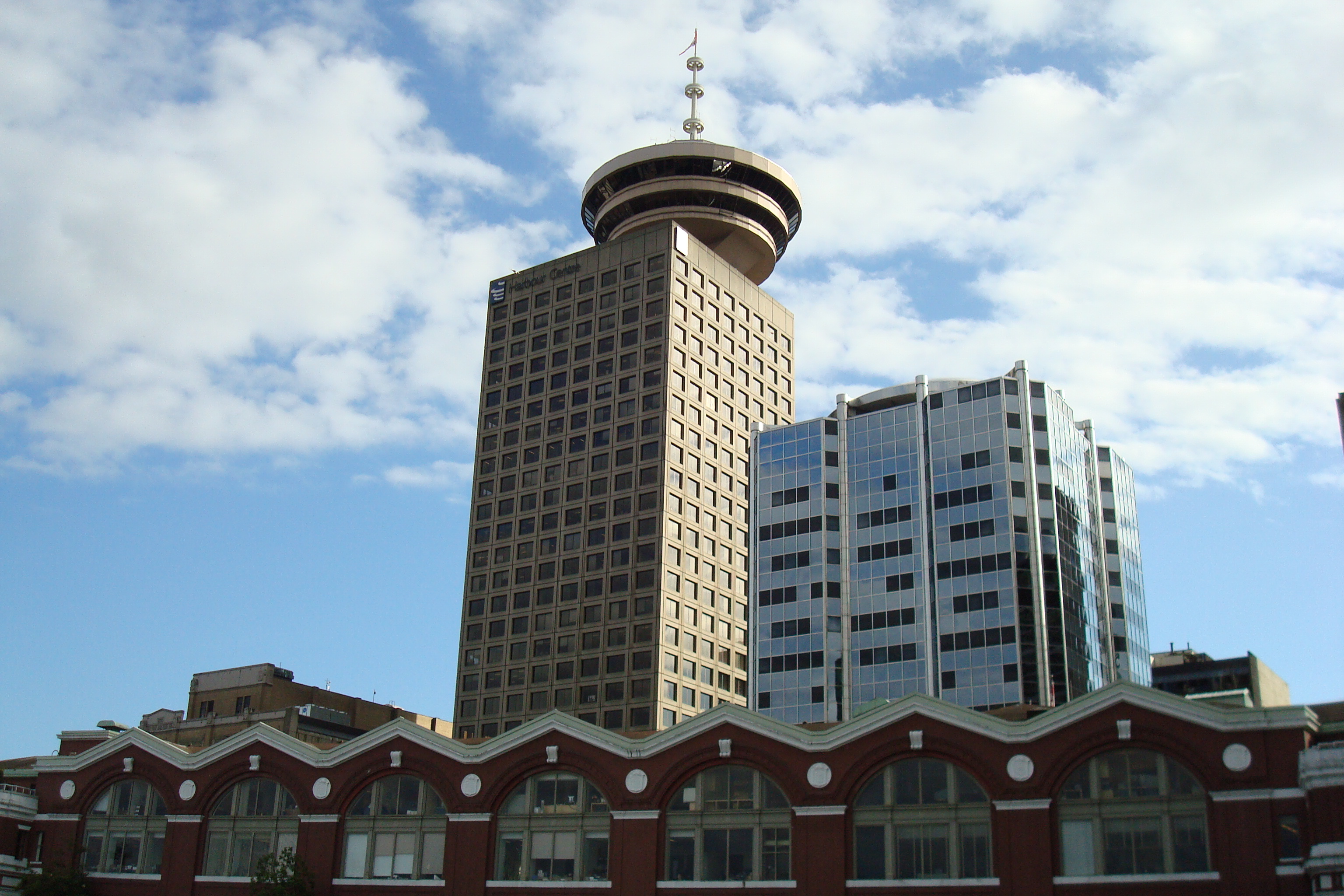 Vue du Harbour Centre de Vancouver depuis l'arrière de la gare